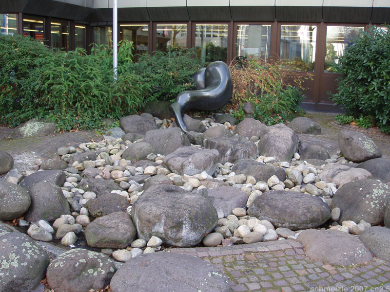 Brunnenanlage (1982) von Gerlinde Martina Klepsch (* 1924) vor dem Arbeitsamt in Heilbronn